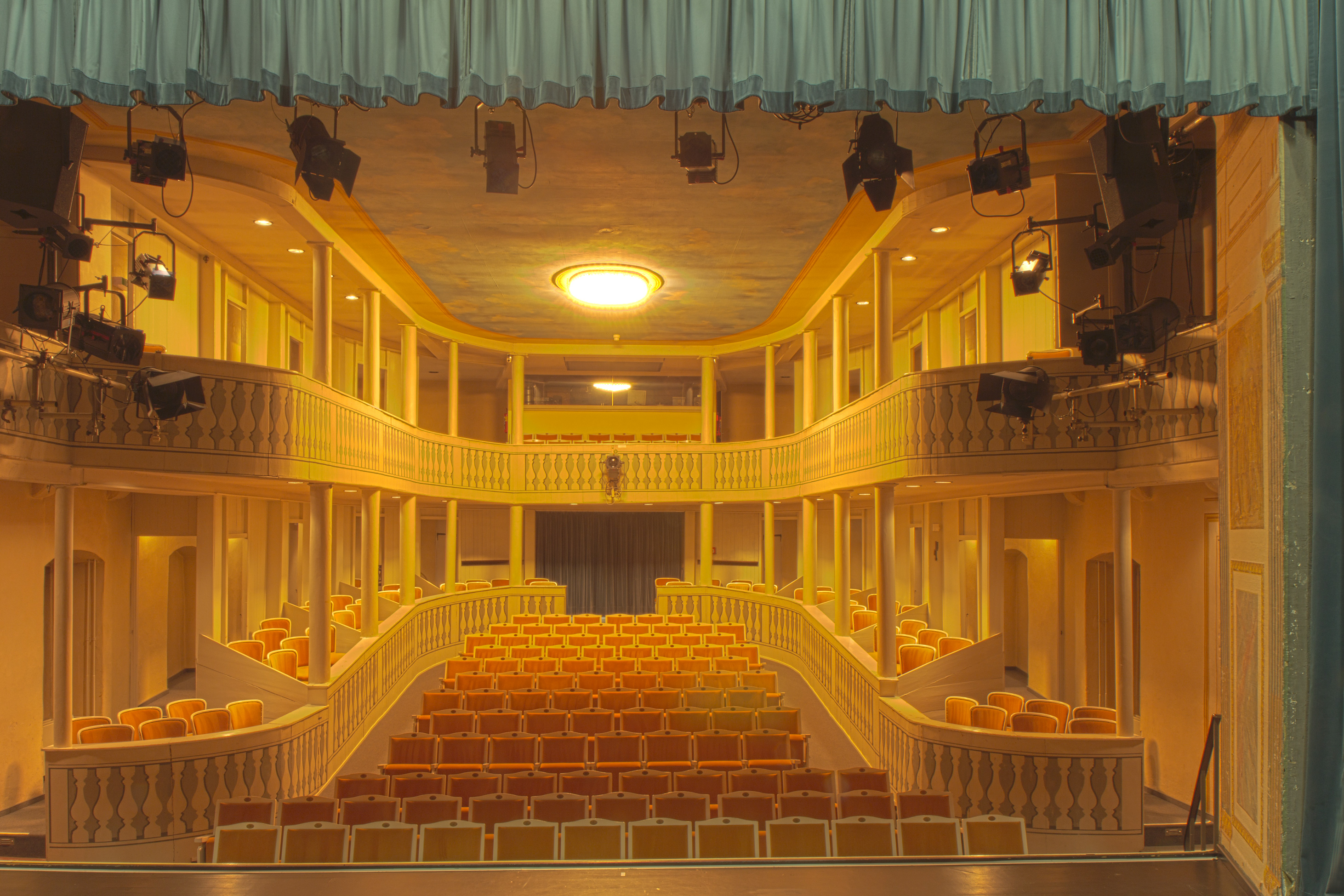 Innenansicht - Blick von der Bühne in den Zuschauerraum. 1781 für Wilhelm von Hessen-Kassel errichtetes Comoedienhaus, Bestandteil der Parkanlage Wilhelmsbad in Hanau. Eines der wenigen historischen Theater in Deutschland, in dem barocke Bühnenmaschinerie und historische Bühnenbilder erhalten sind.